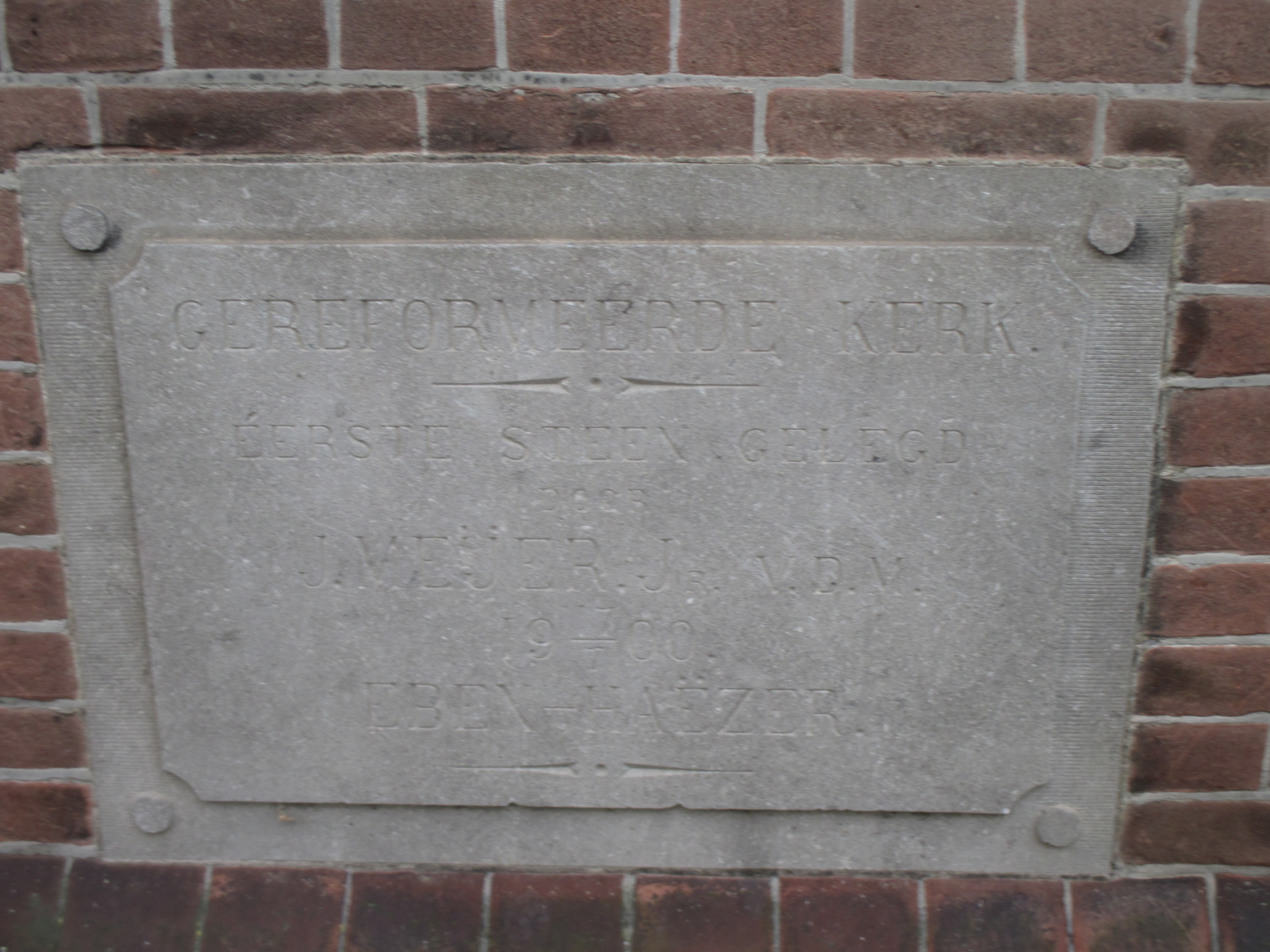 Vroeger de gereformeerde Eben Haezer kerk in Zaltbommel